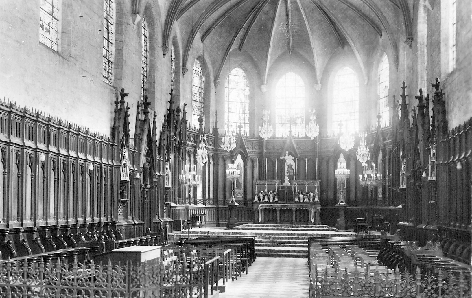 Le chœur de l'église Saint-Etienne de Jargeau, Loiret